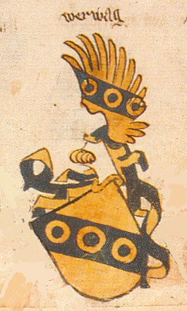 Ingeram-Codex der ehemaligen Bibliothek Cotta werwag freigestellt aus